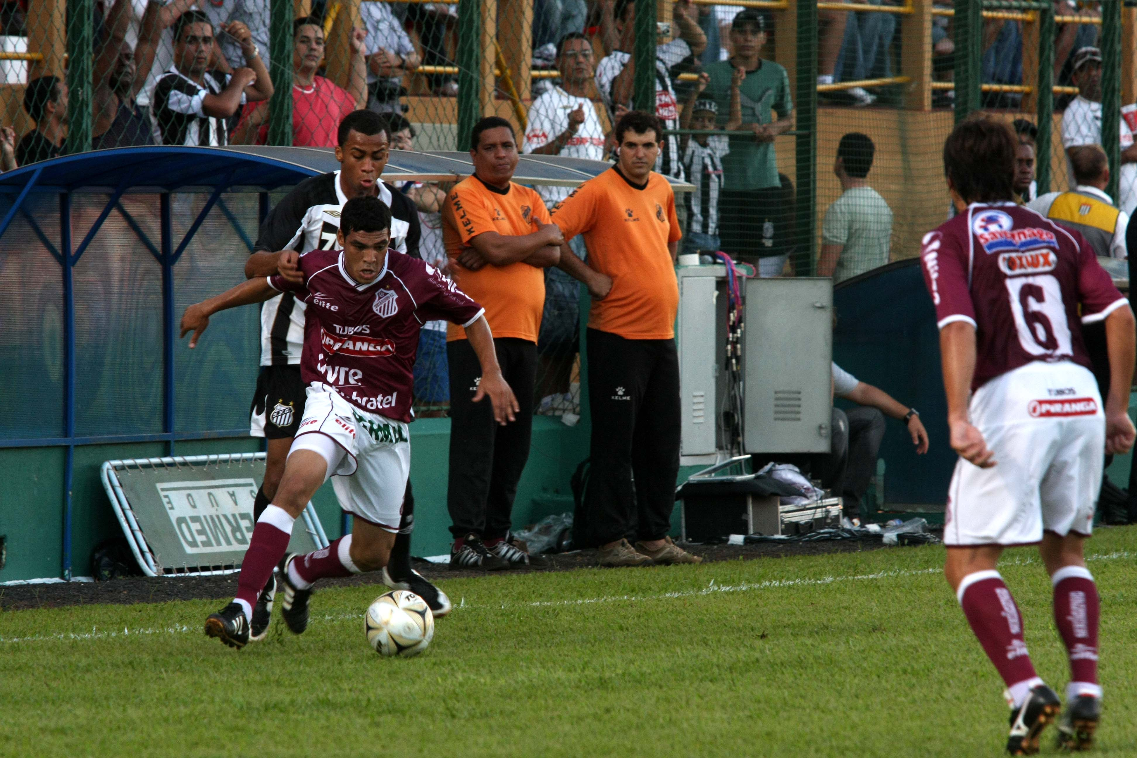 CAMPEONATO PAULISTA 2008 FUTEBOL ESPORTES SETÃOZINHO X SANTOS Lance durante a partida. - ESTÁDIO FREDERICO DALMAZO SERTÃOZINHO/SP BRASIL 01/03/2008 Foto: Junior Faria/GazetaPress código da foto: Campeonato Paulista 2008 - Sertãozinho x Santos